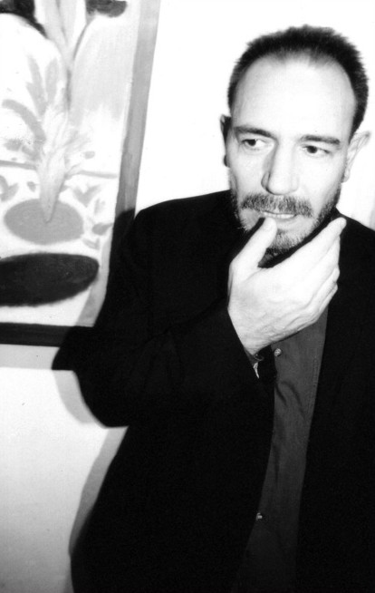 Lorenzo Mattotti, pittore, illustratore, autore di fumetti. Foto di Joe Zattere (Fumetti d'Italia)